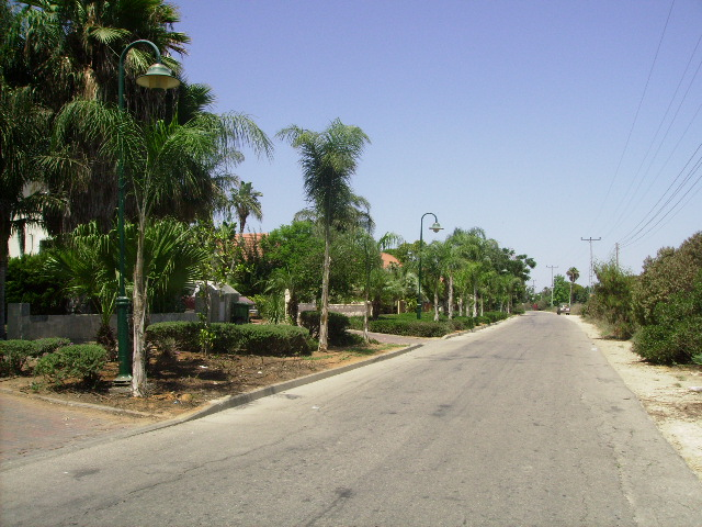 רחוב בכפר אביב